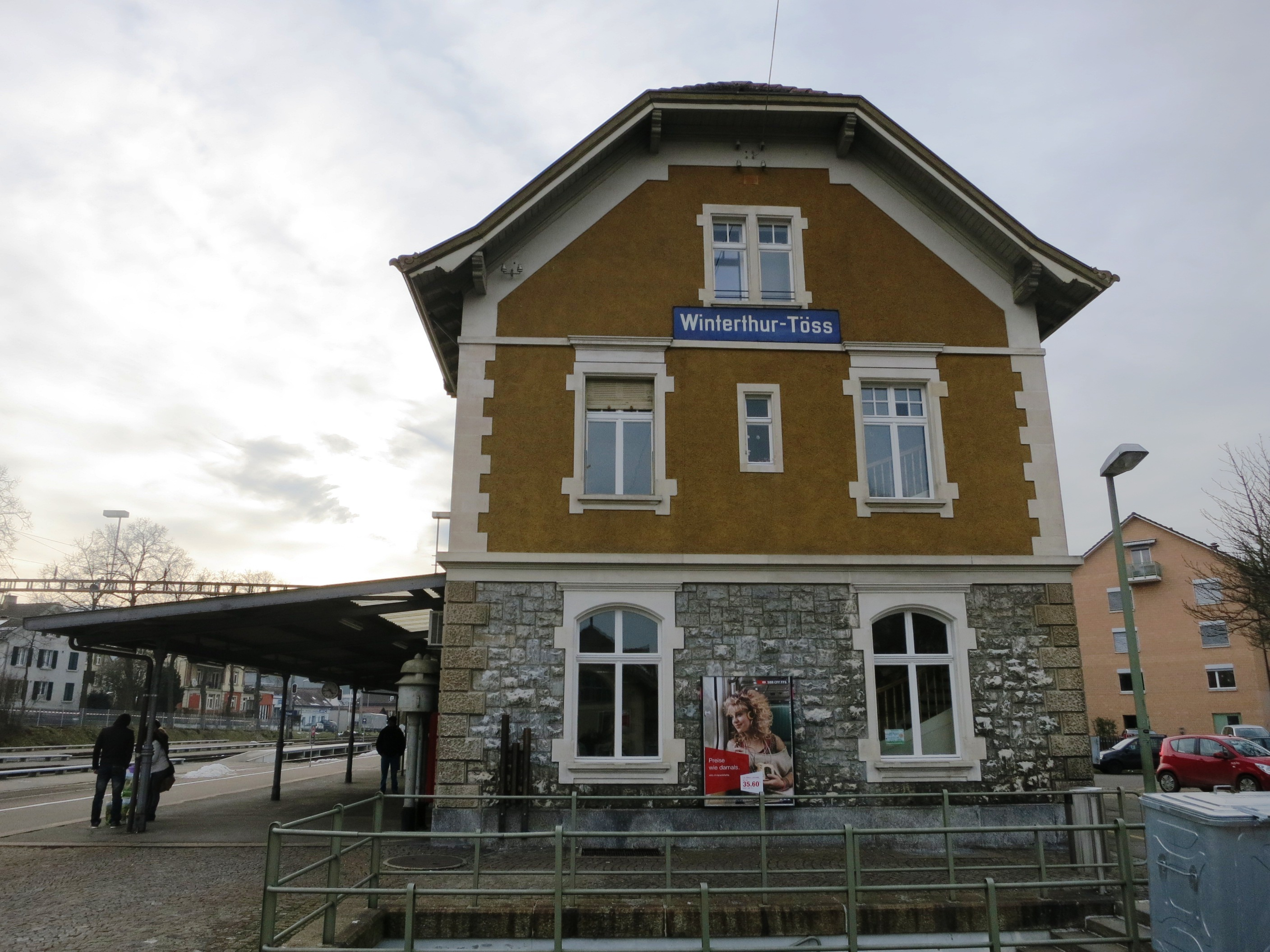 Bahnhof Winterthur-Töss ZH, Schweiz